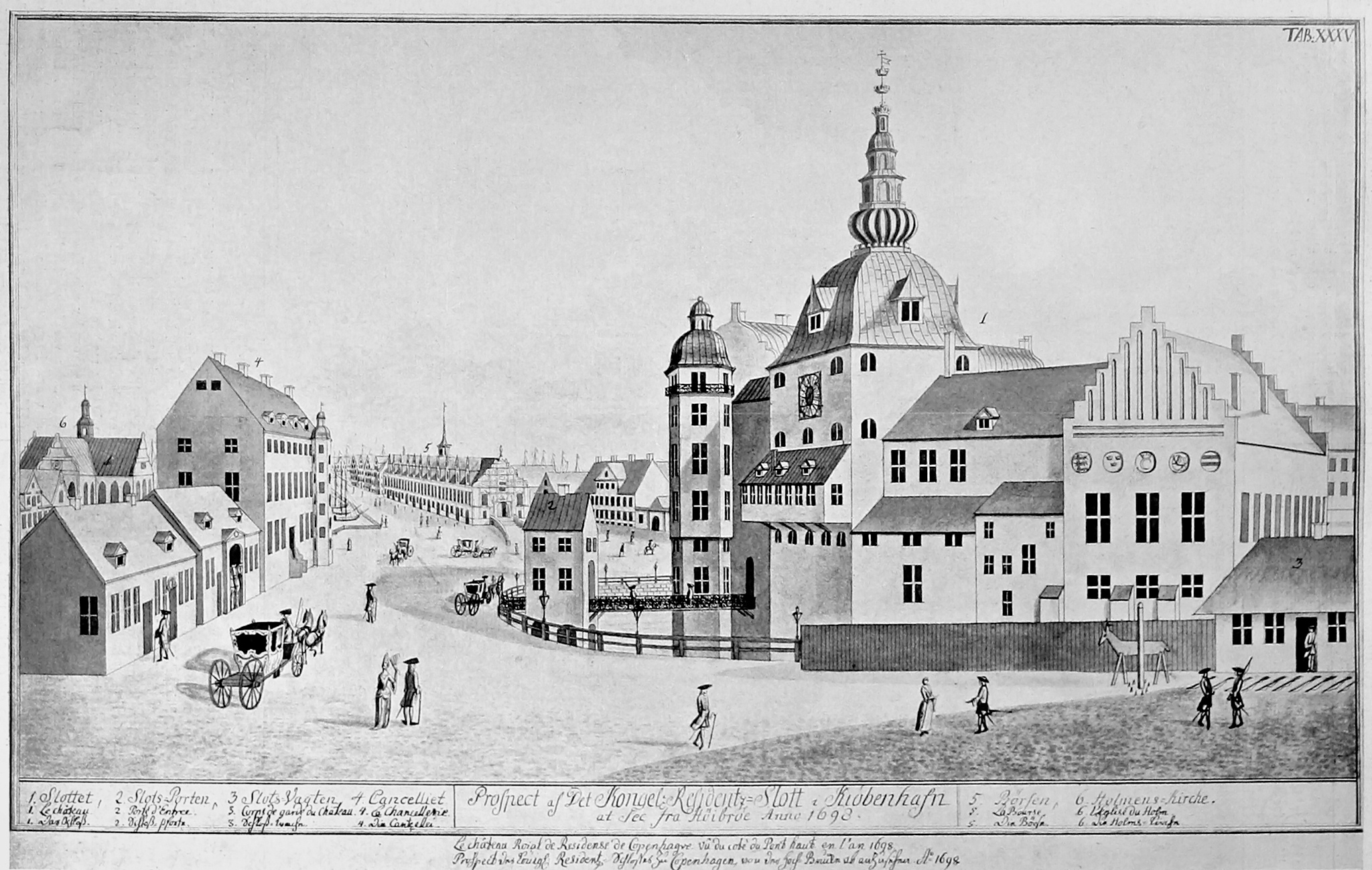 Københavns Slot (Copenhagen Castle), 1698